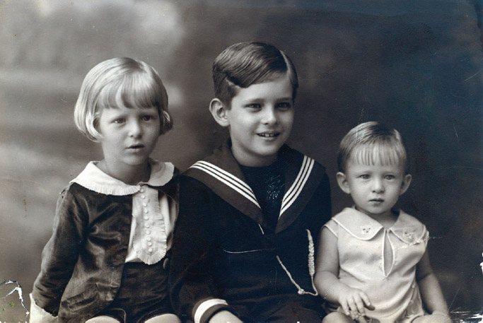 O matemático brasileiro Paulo Ribenboim quando pequeno (à esquerda) com os irmãos Hermano e Mário (à direita).